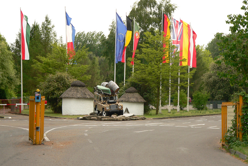 Eingang Serengetipark